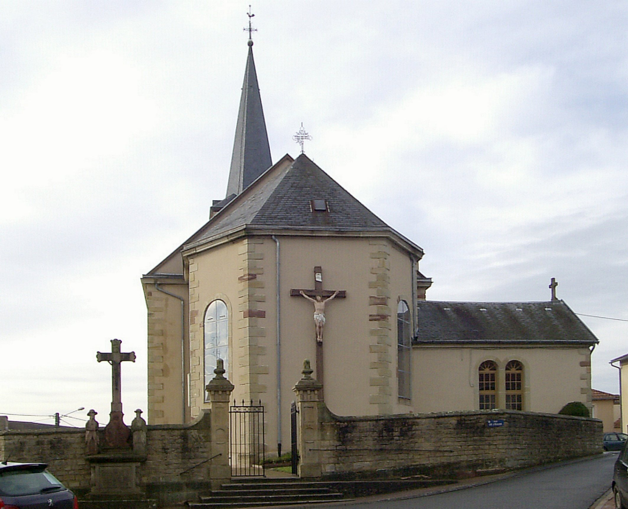 L'église Saint-Laurent à Freybouse